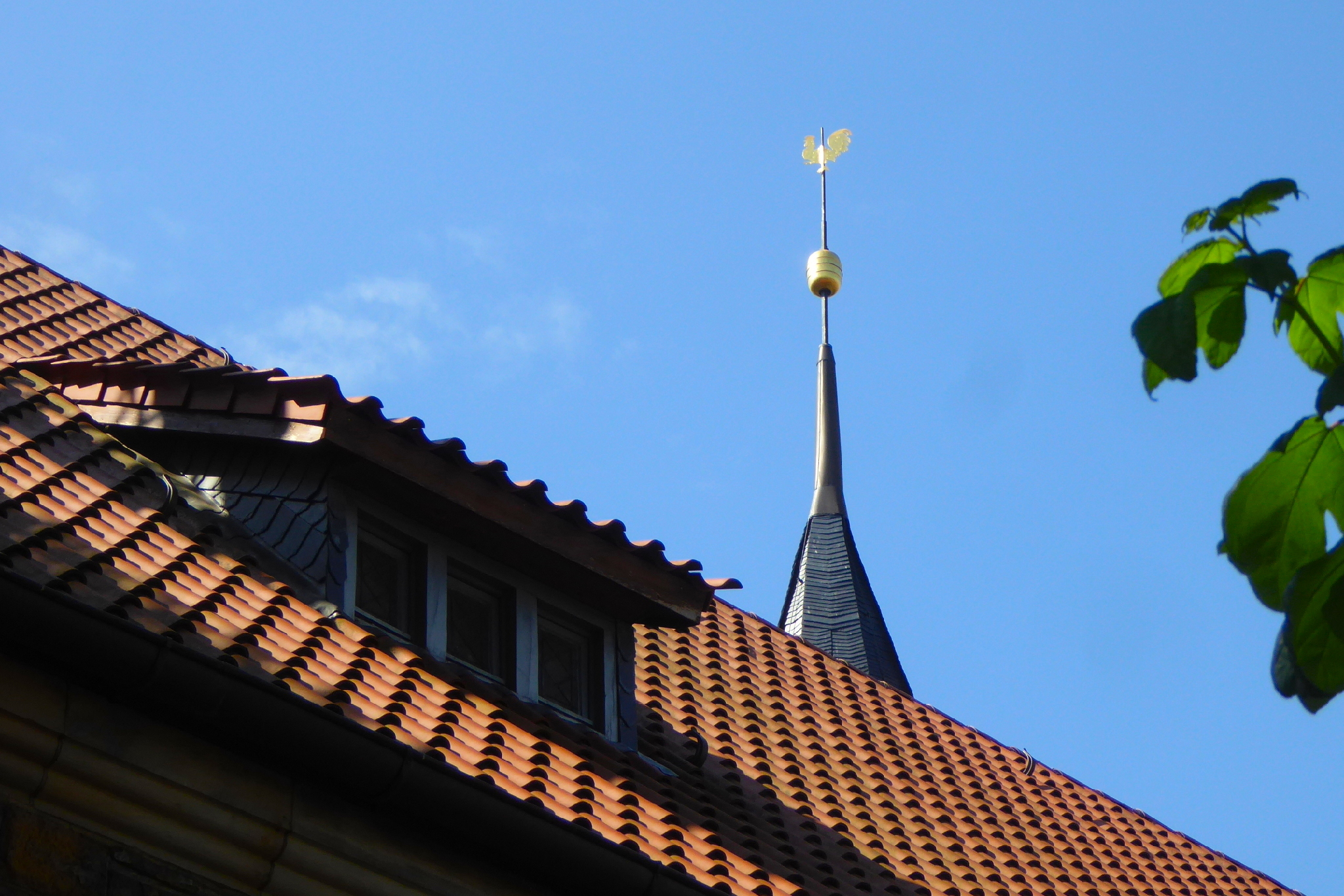 Oberer Teil der Kirchturmspitze mit Helmstange (Eisen), Knopf und Wetterhahn.